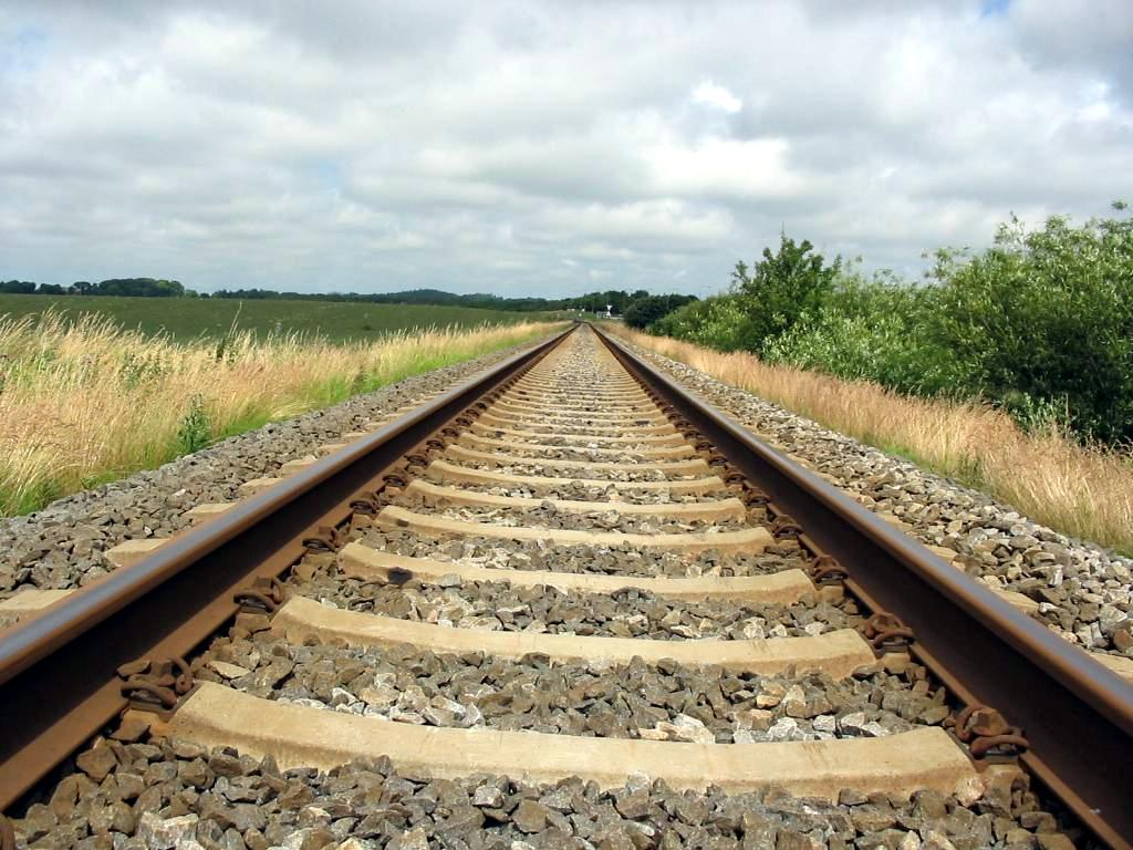 Image taken in Northern Denmark (Hjørring - Hirtshals line; see Nordjyske Jernbaner, ved Herregårdsparken)